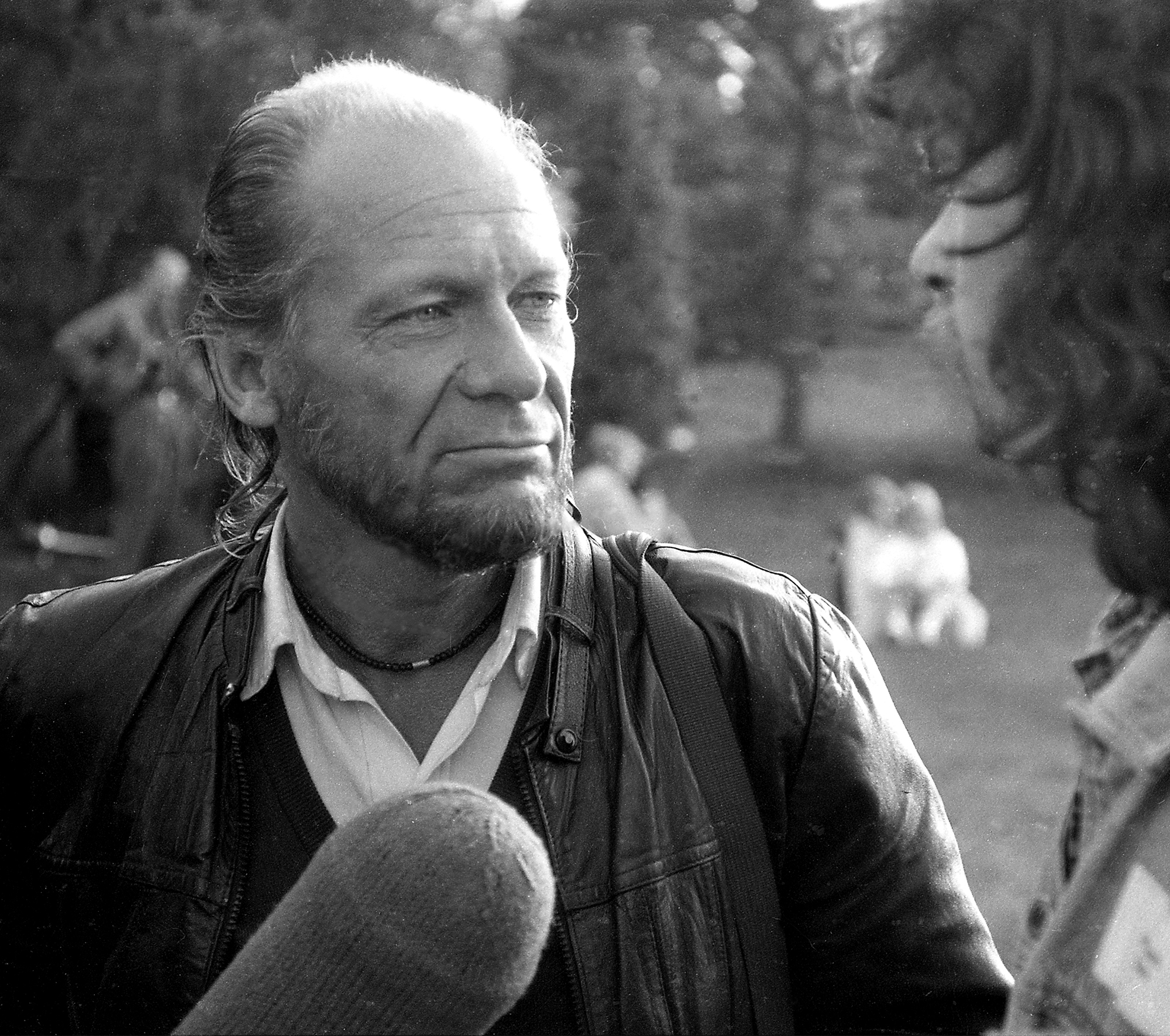 Peeter Tooming, fotograaf ja dokumentaalfilmide režissöör. 89